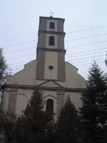 Serbian Orthodox Church in Adaševci, Serbia, Vojvodina/L'église orthodoxe serbe de Adaševci, Serbie, Voïvodine